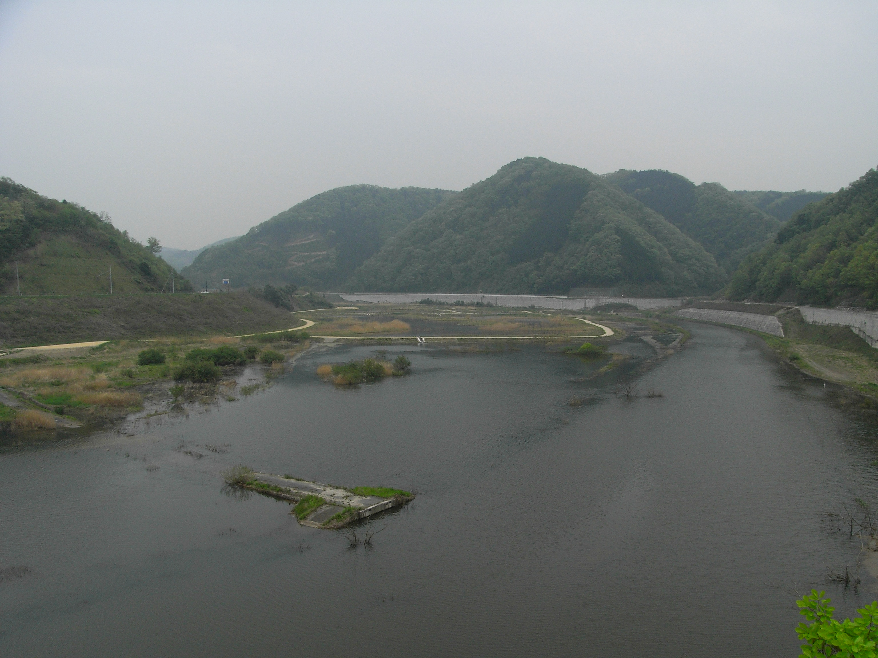 Valley